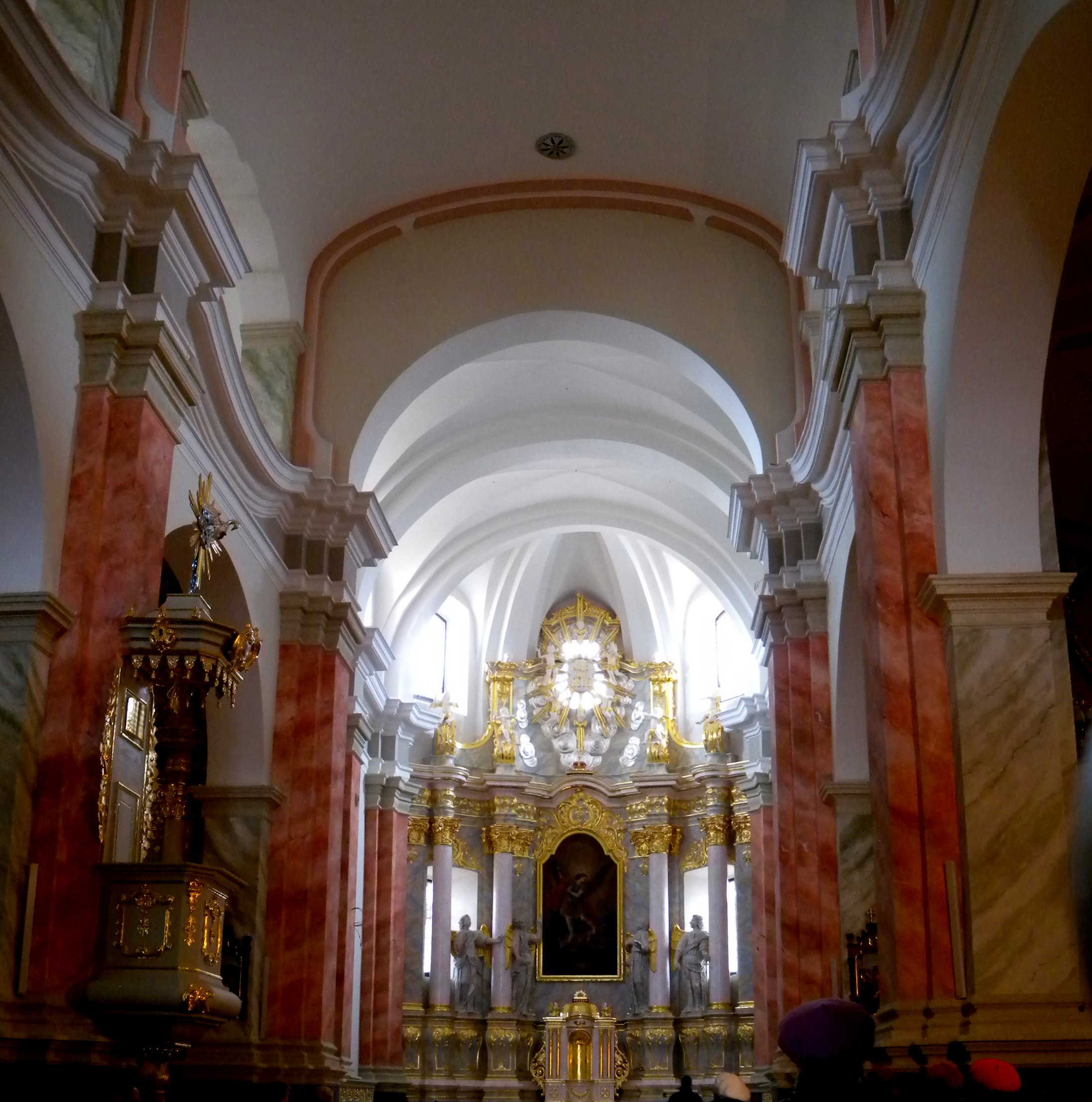 Kolegiata Nawiedzenia Najświętszej Maryi Panny i św. Michała Archanioła w Łasku